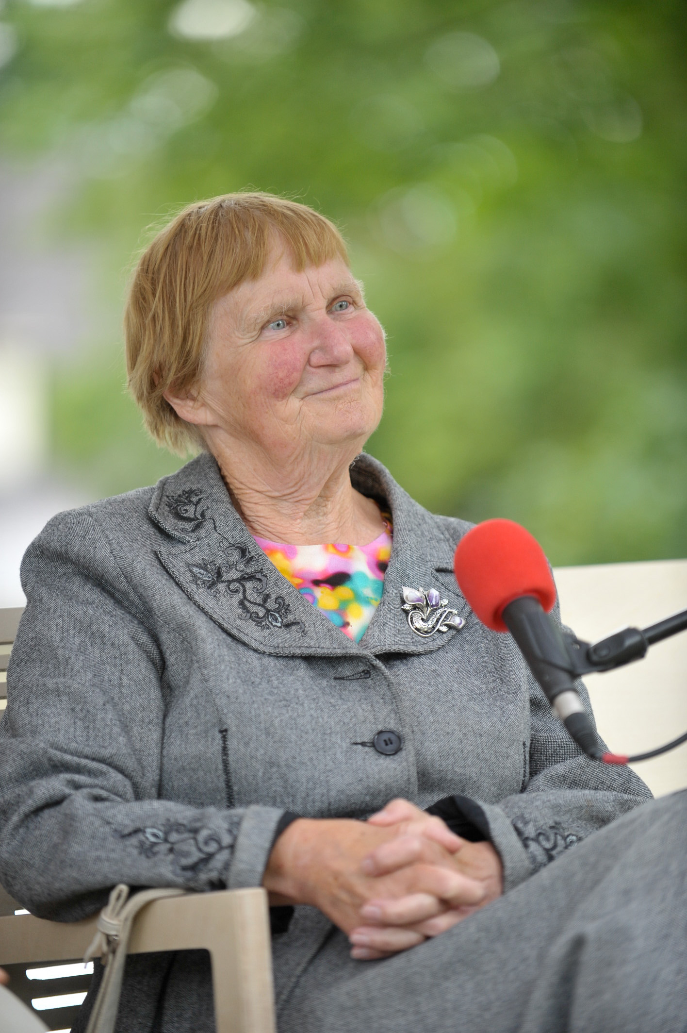 Arvamusfestival 2014: "Kas väljaränne on üldse probleem"